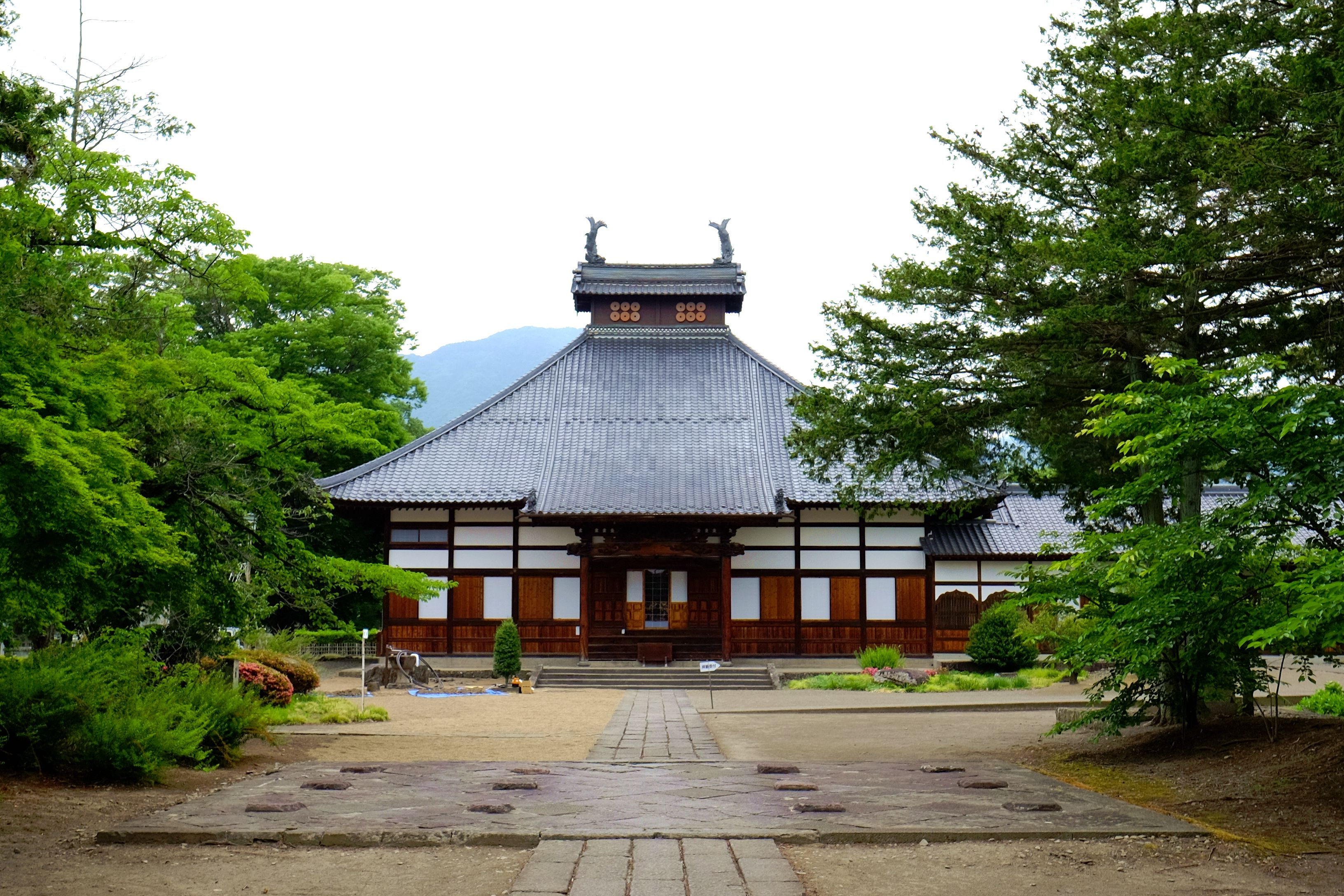 本堂、屋根に真田氏の家紋のひとつである六文銭が見えます。